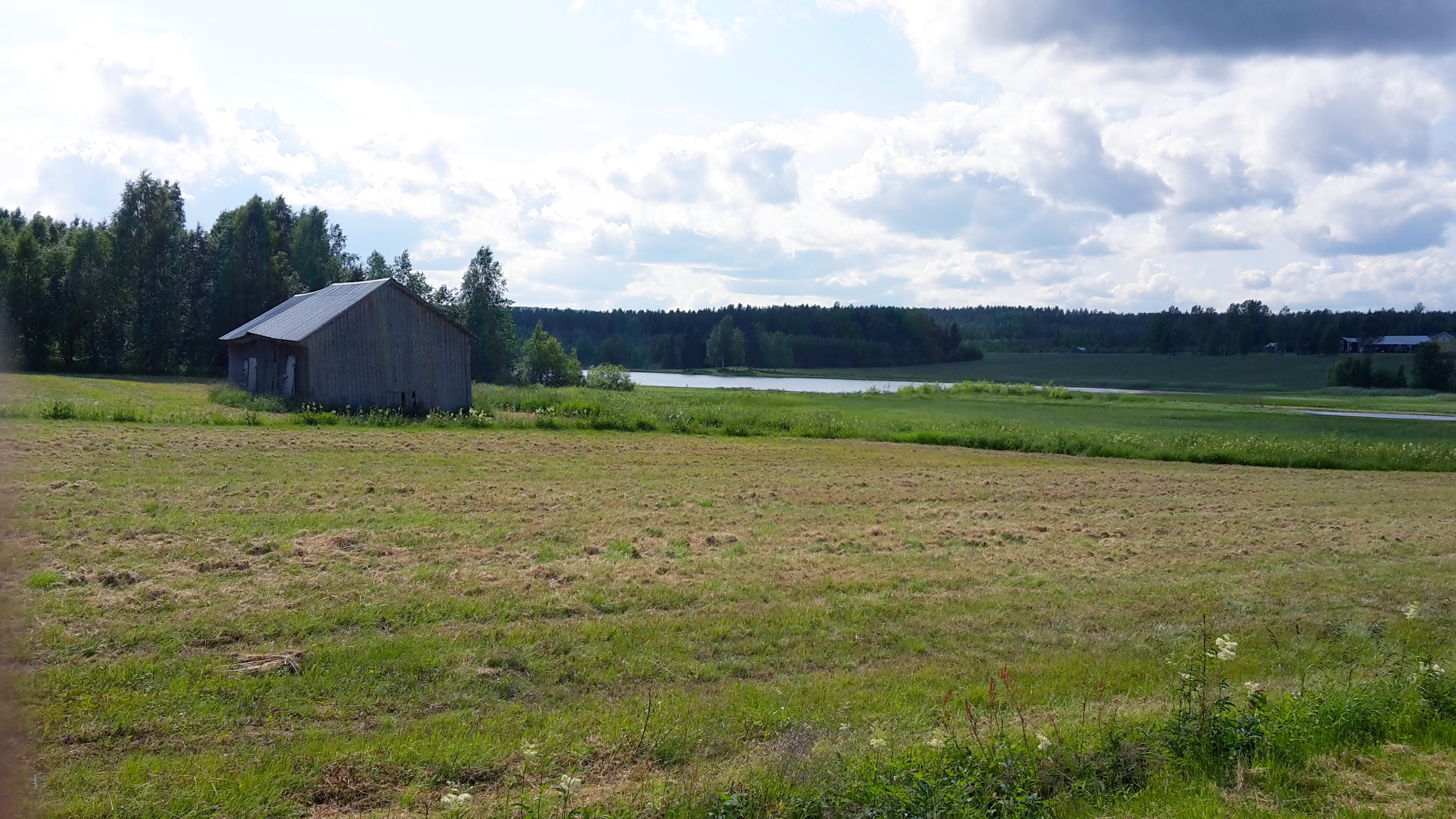 Ledusjön fotograferad från väg 353 i Ledusjö, sjöns nordöstra hörn.